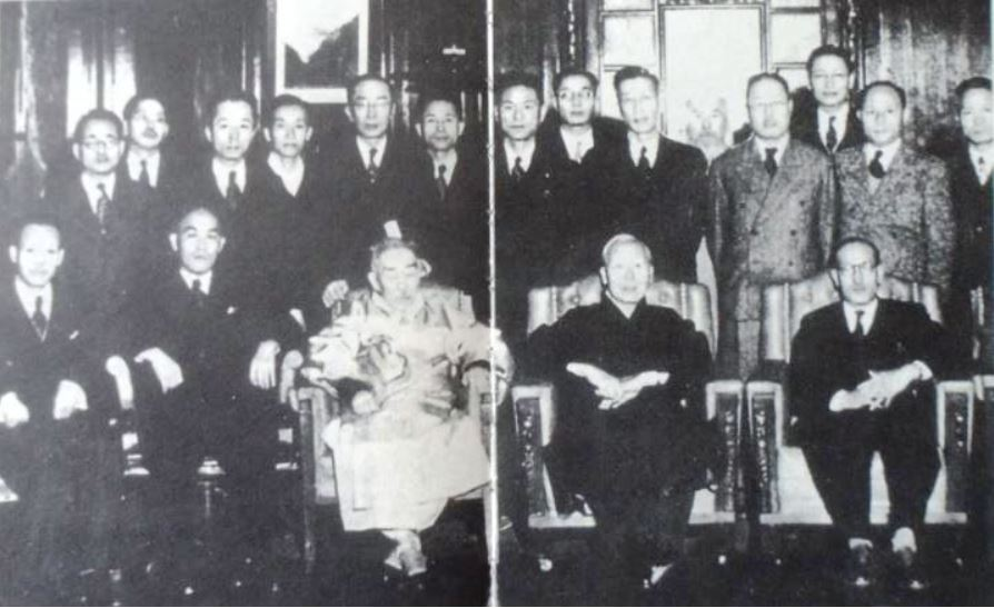 中文（中国大陆）: 大韩民国首届政府阁僚